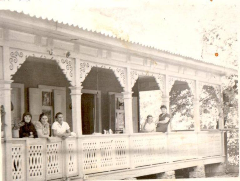 ზურაბ მაისაშვილის ოდა სახლი 1930 წელს